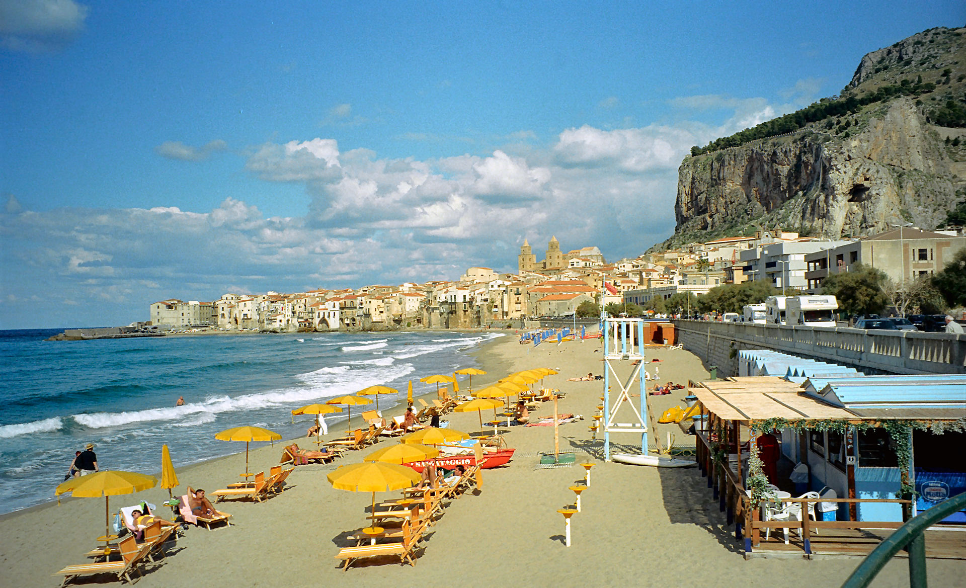 Cefalù - panorama, Sicily